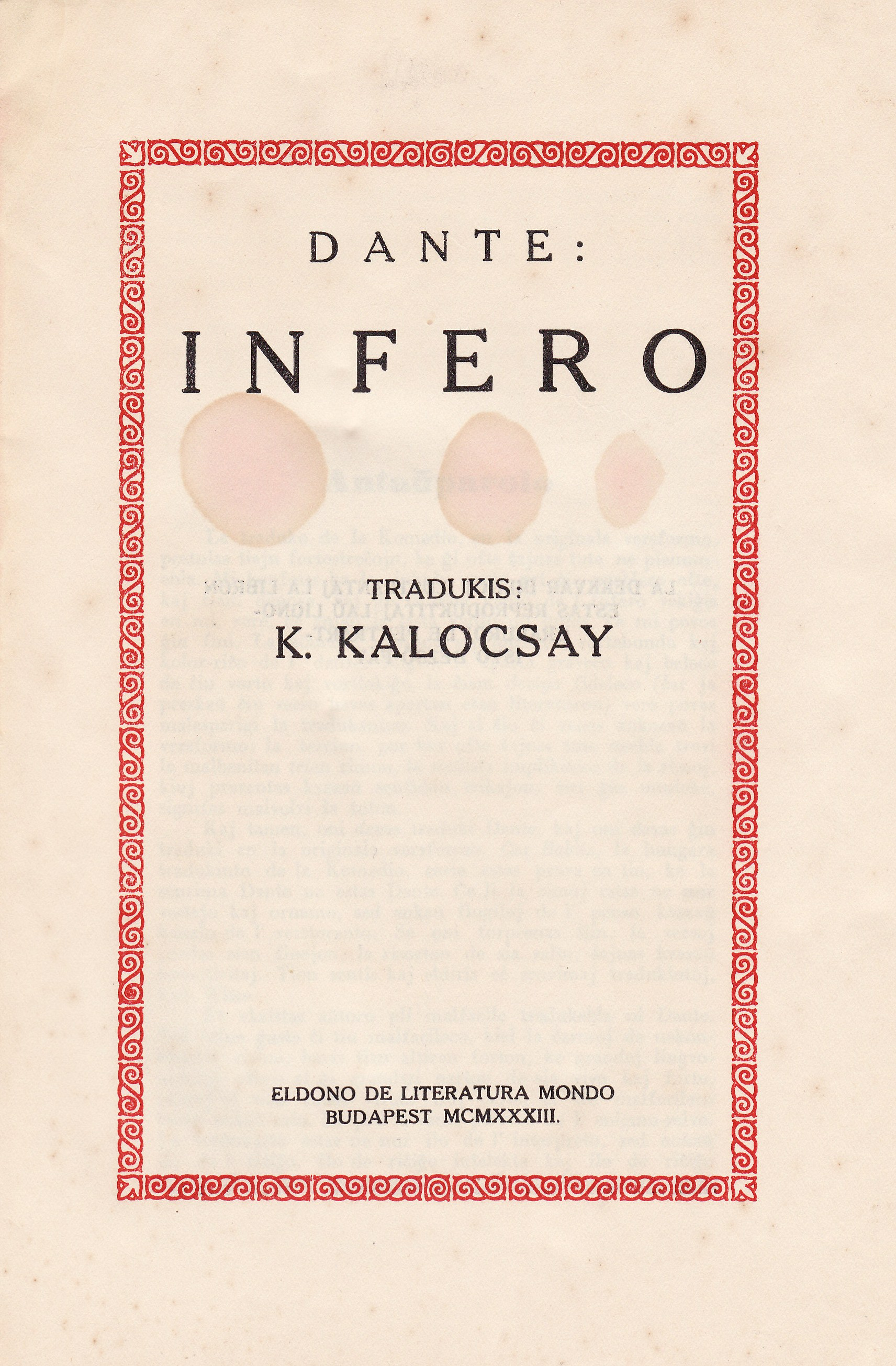 la kovrilpaĝo de "Dante : Infero"